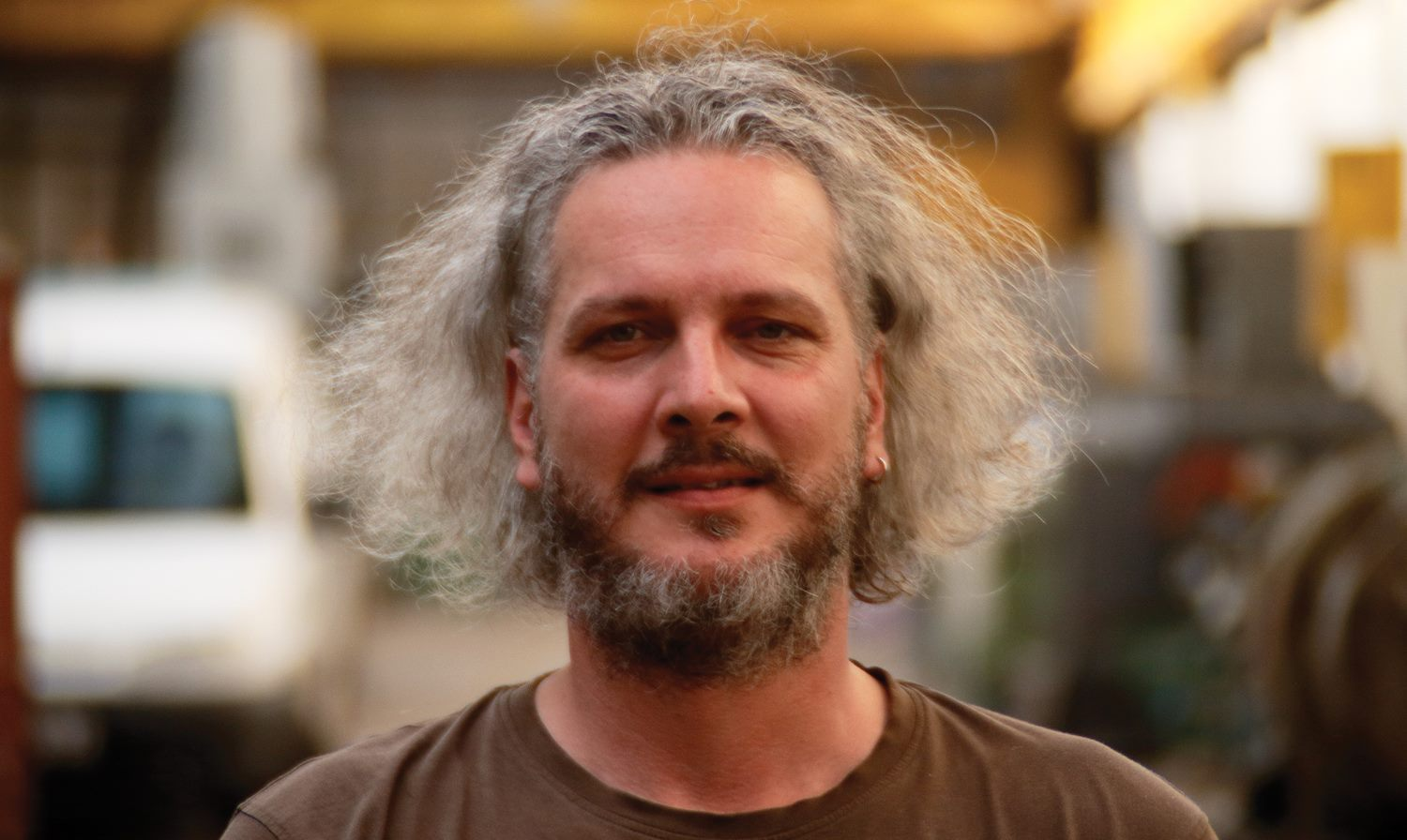 Cziczó Attila